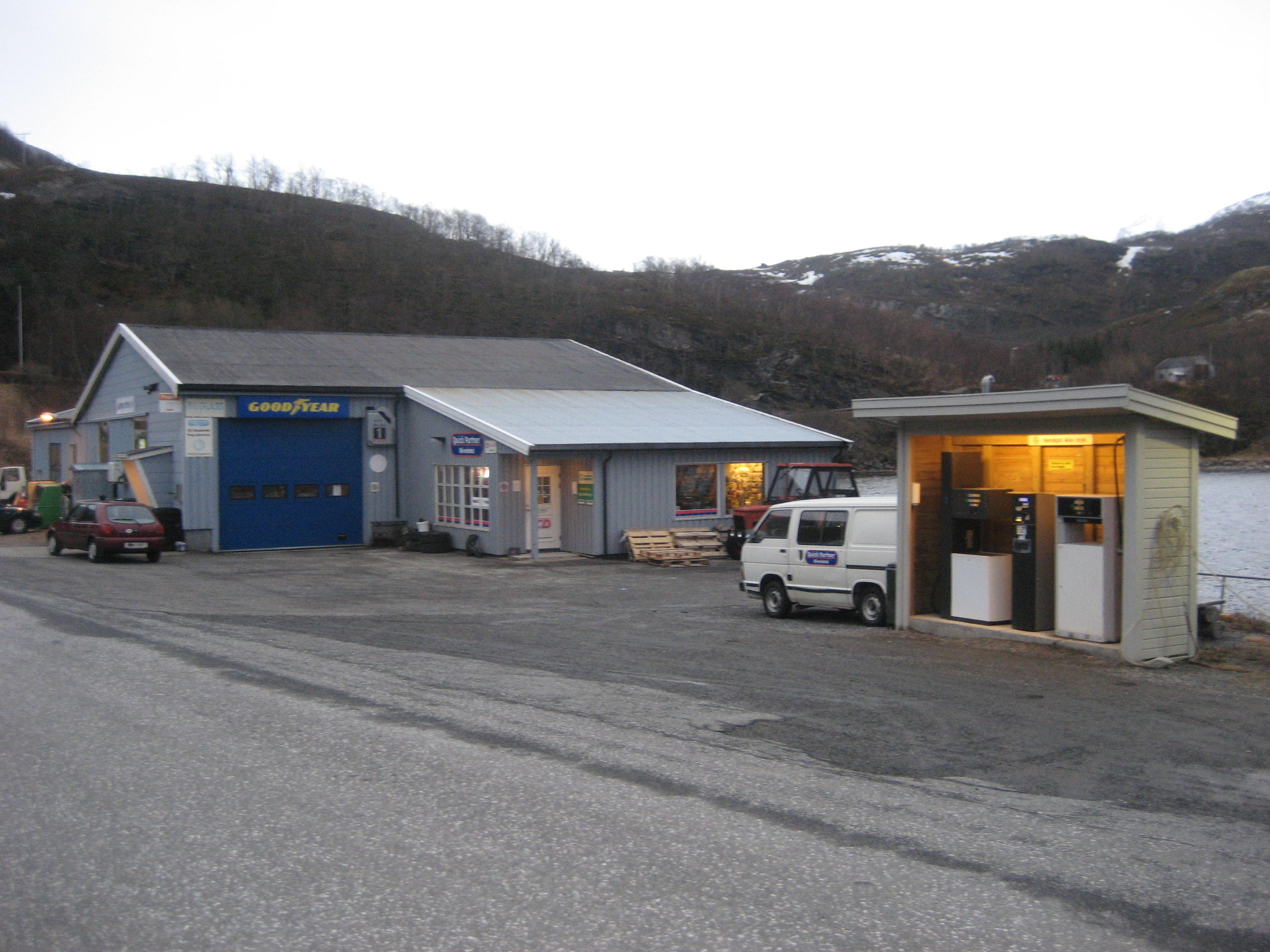 Bilverksted, Kvina, Lurøy kommune: desember 2008